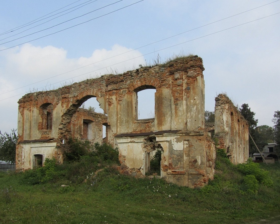 Высокае. Сінагога